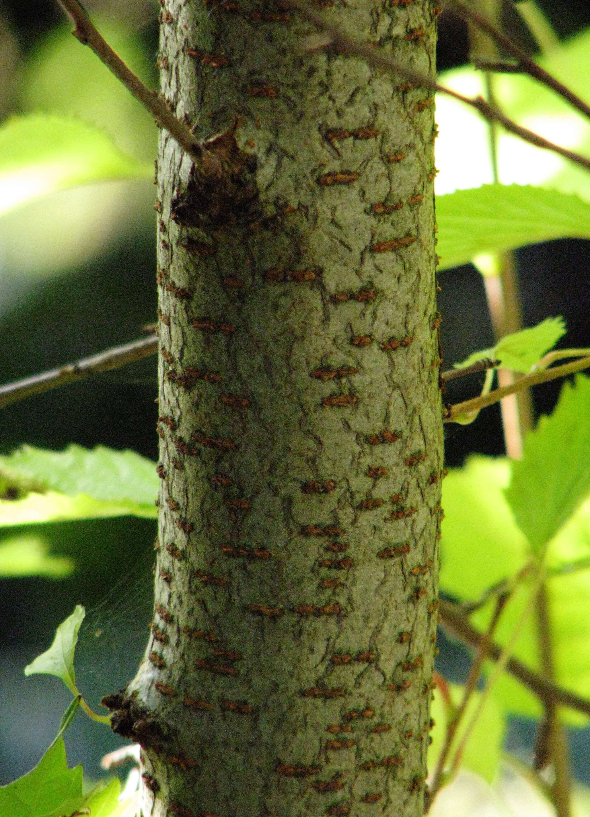 Olszanka chińska (Euptelea pleiosperma), pień, okaz uprawiany. Ogród Botaniczny Uniwersytetu Wrocławskiego, Wrocław, Polska.